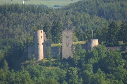 Burgruine Schönecken, 16.06.2005)